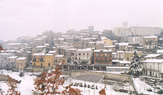 Timpano Gianfranco, opera propria, Panorama di Zagarise